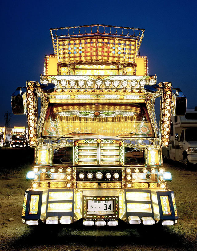 Dekotora art truck from Japan